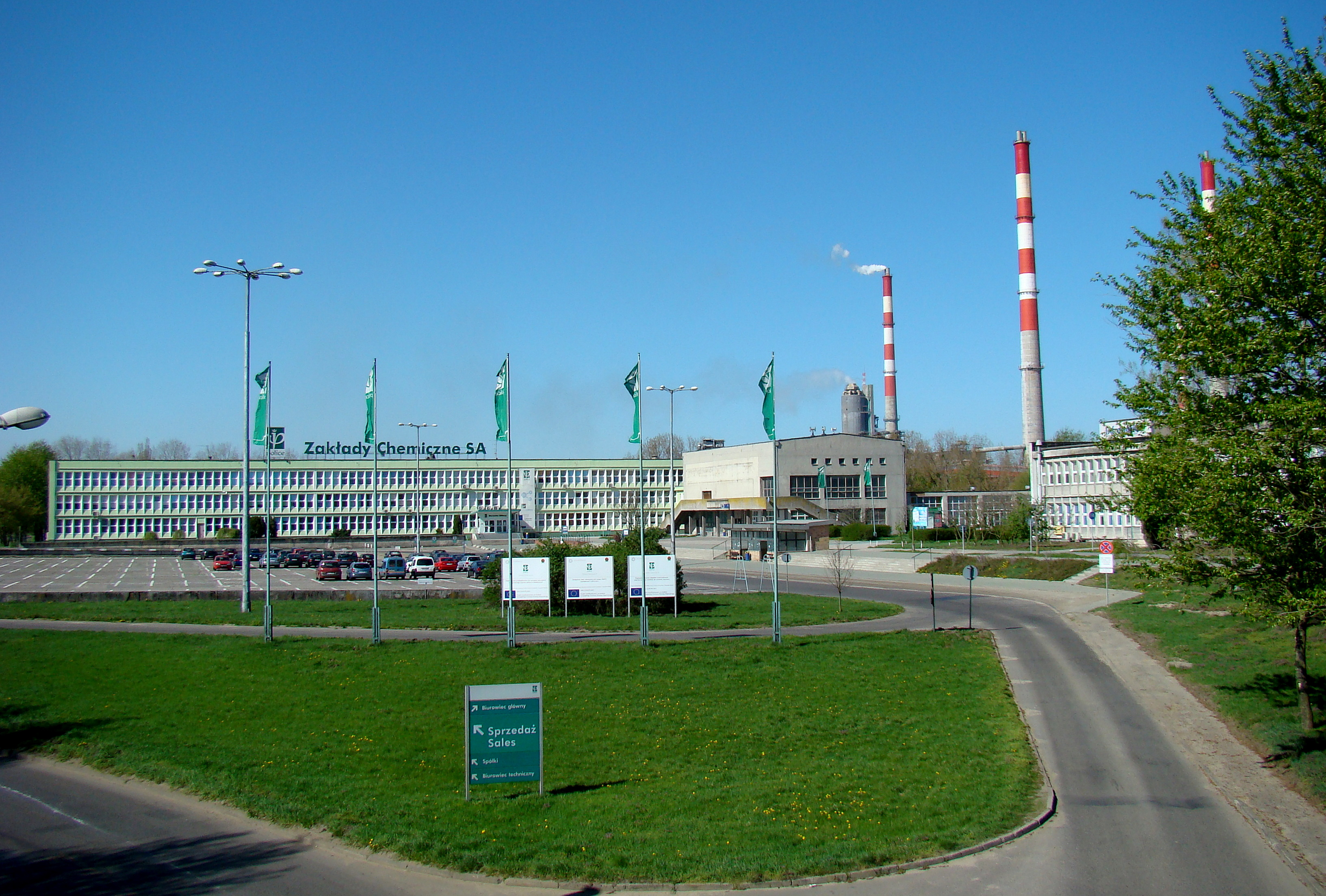 Zakłady Chemiczne Police, (Police, Województwo zachodniopomorskie), Polska